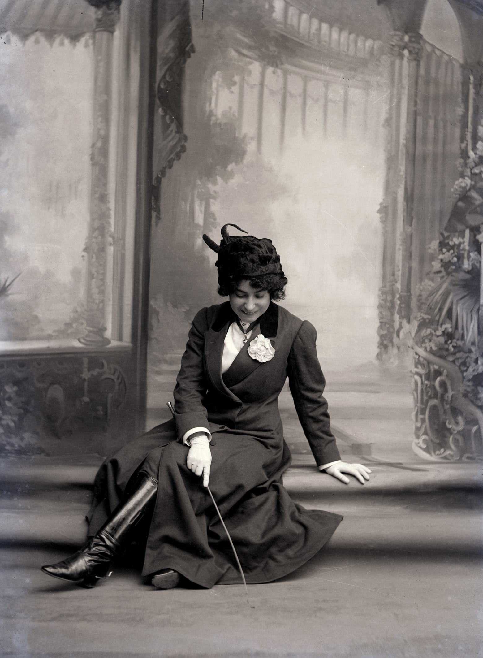 Retrat de Margarita Xirgu